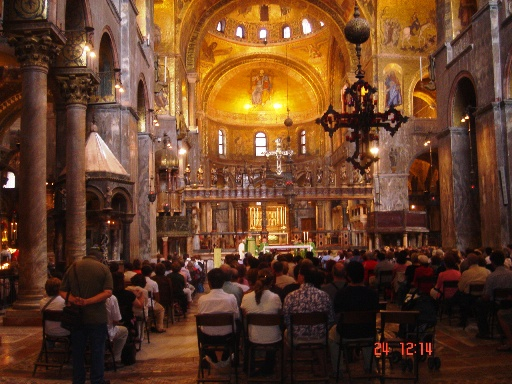 Altare della Basilica di San Marco, Venezia.